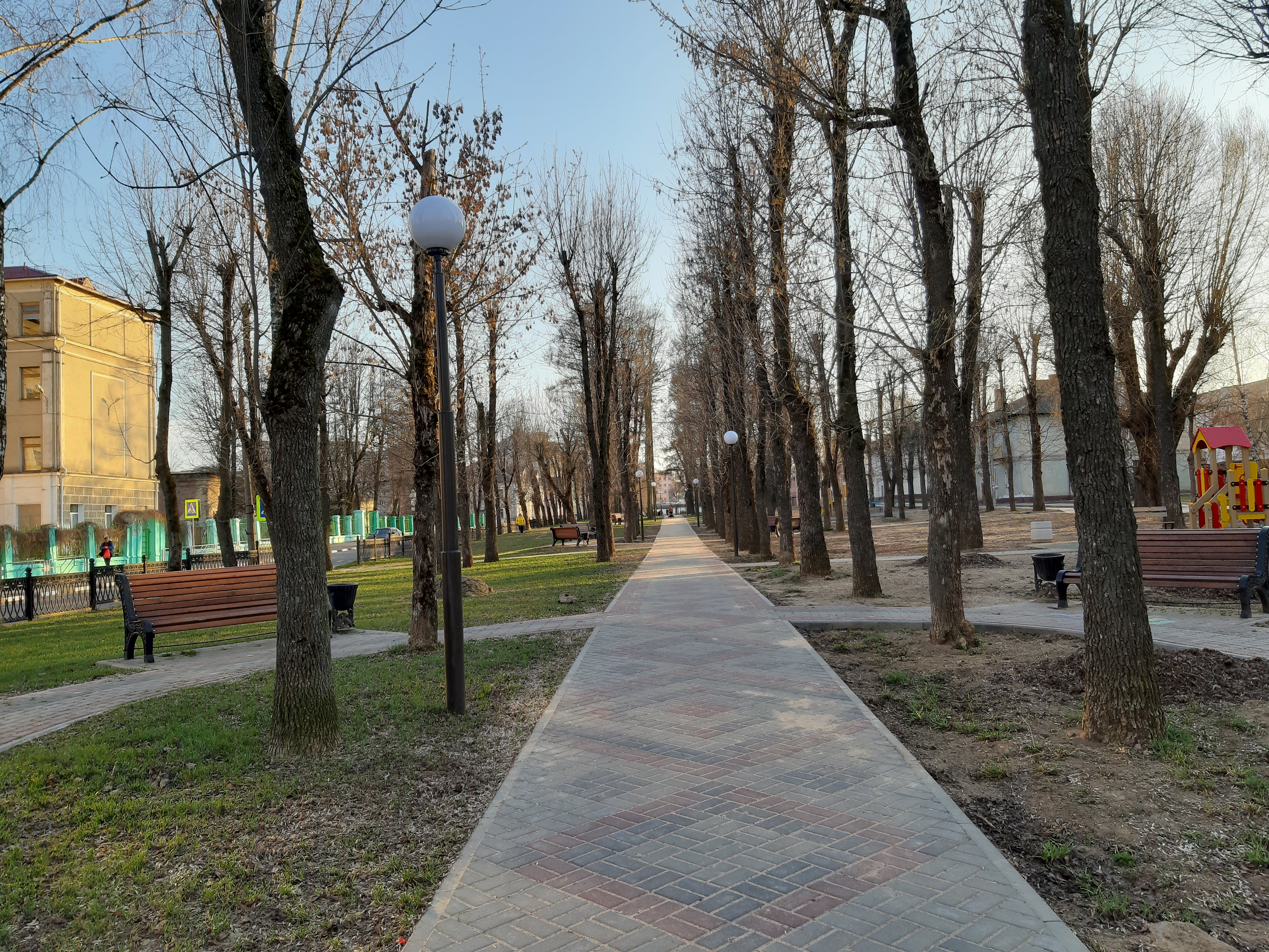 Магілёў. Вуліца Мянжынскага